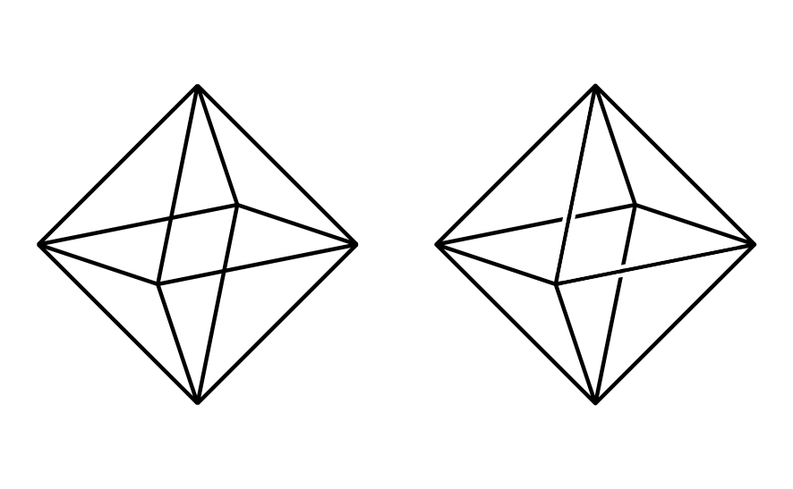 Wireframedarstellung: links ohne, rechts mit Halo